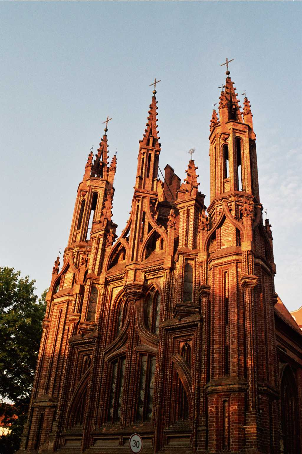 Mi faris tiun foton kaj permesas ĝian uzadon.